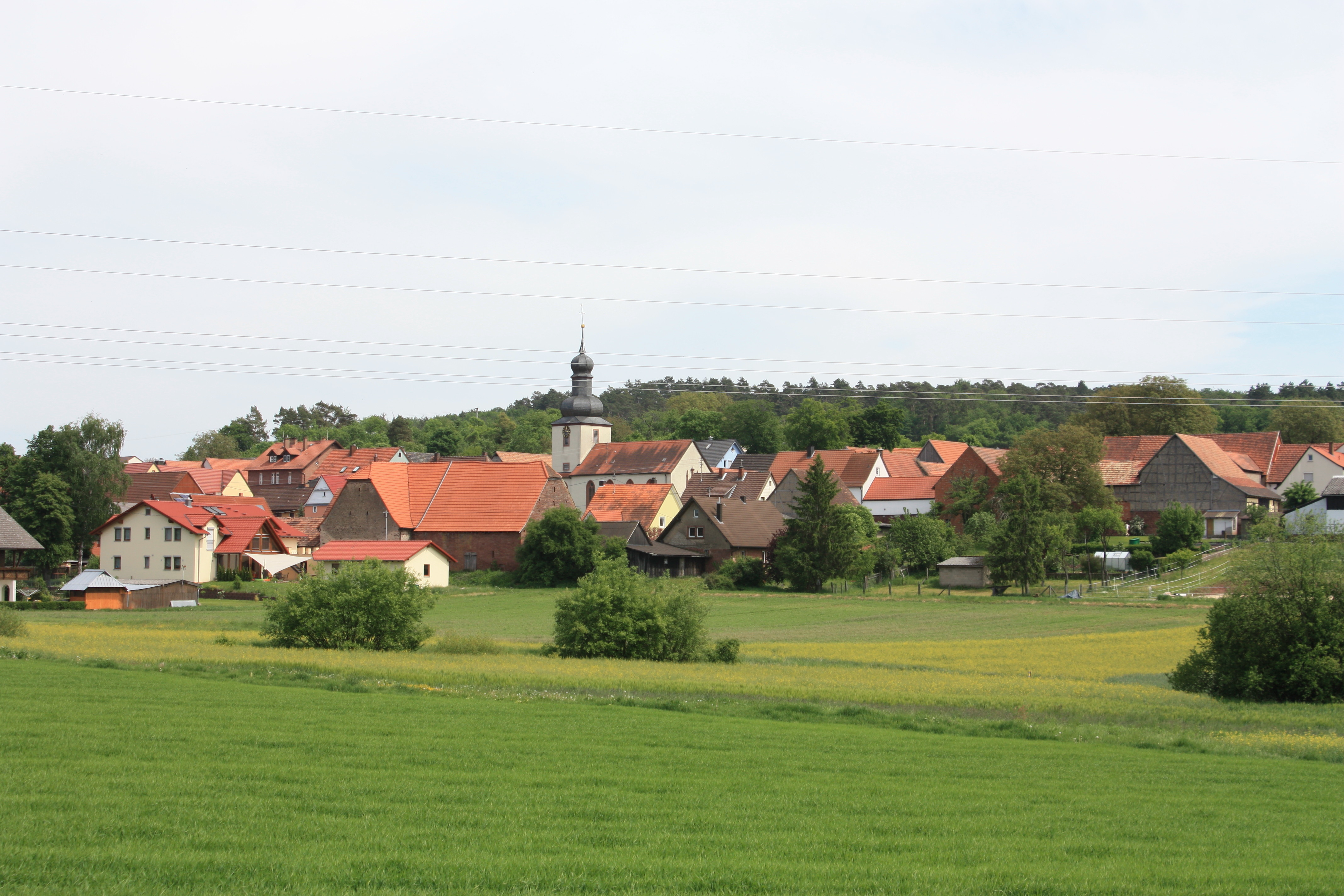 Roden OT Ansbach